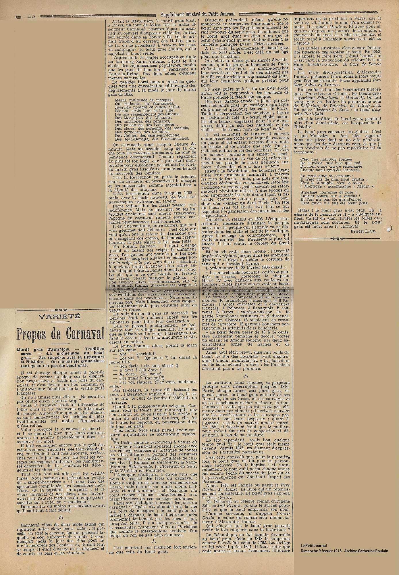 Propos de Carnaval par Ernest Laut à propos de la Promenade du Boeuf Gras à Paris